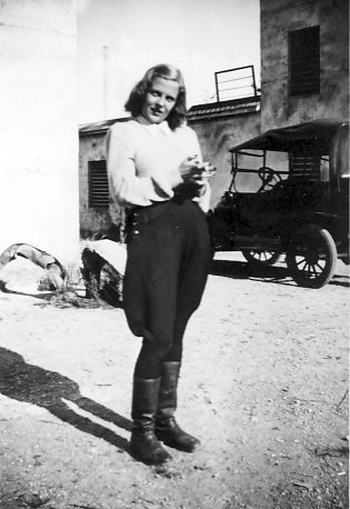 Näyttelijä Regina Linnanheimo vuonna 1943 elokuvan Herra ja Ylhäisyys kuvauksissa Nummelan lentokentällä.